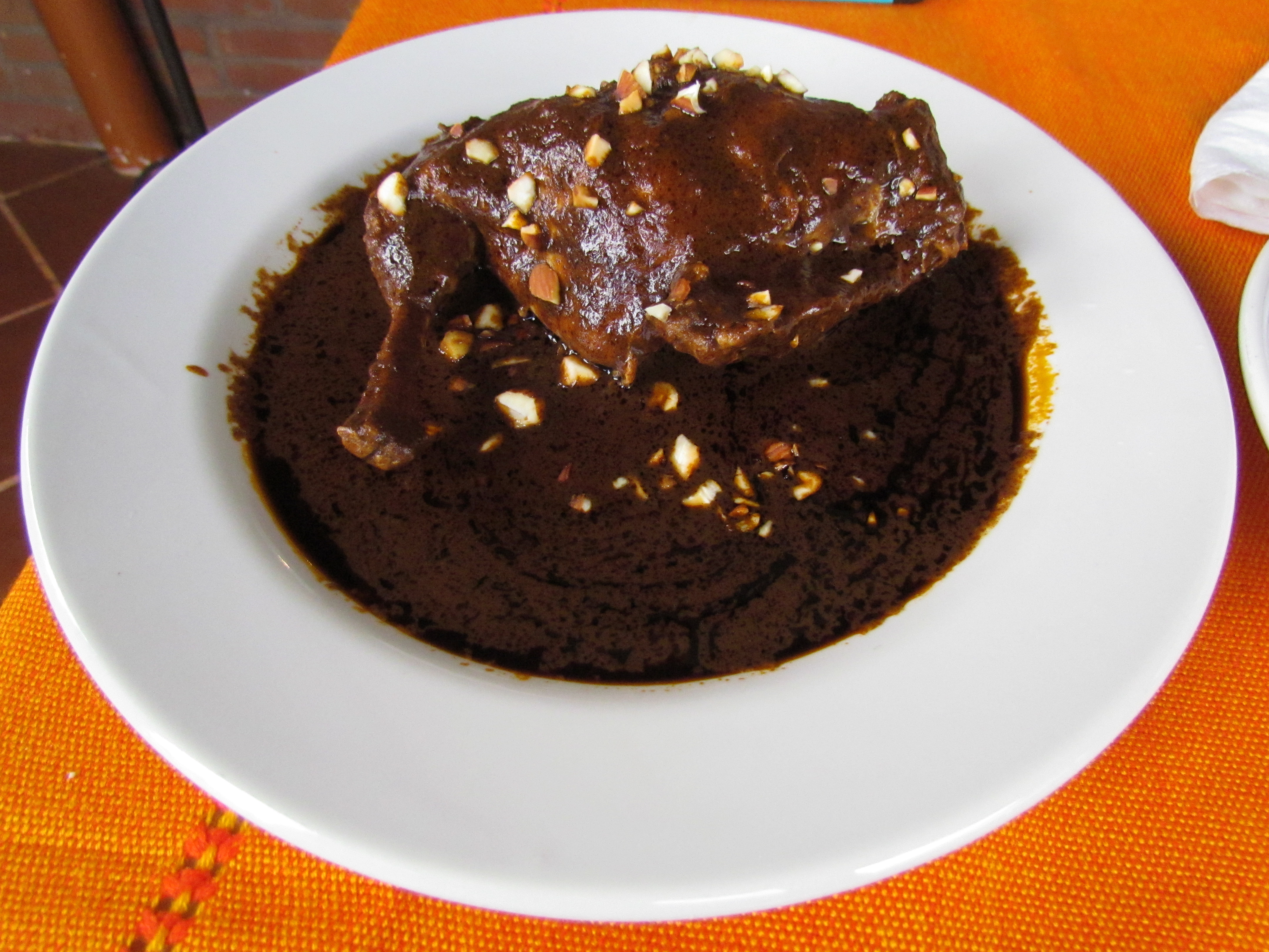 Conejo con mole almendrado en la Feria del Mole 2014